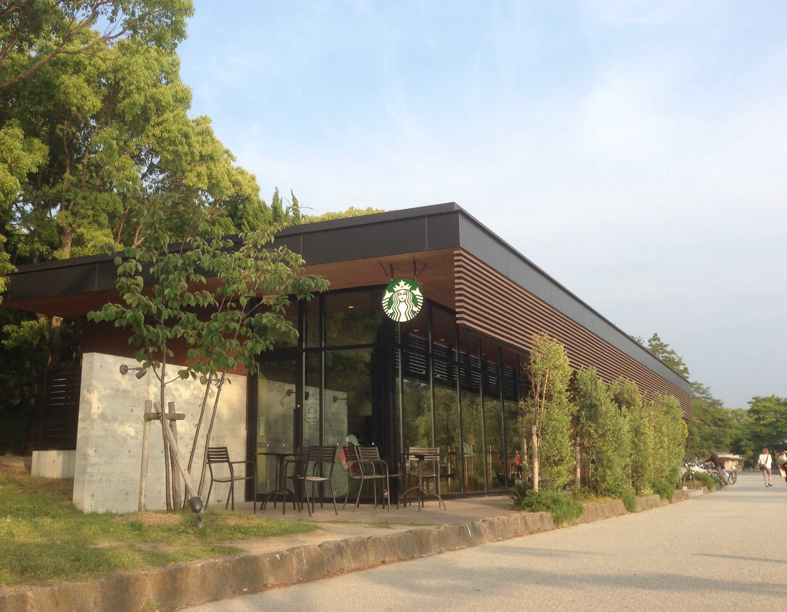 Starbucks in Ohori Park